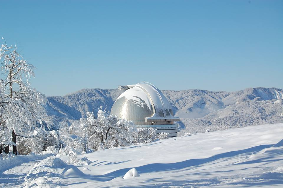 gvbdjhfkjf